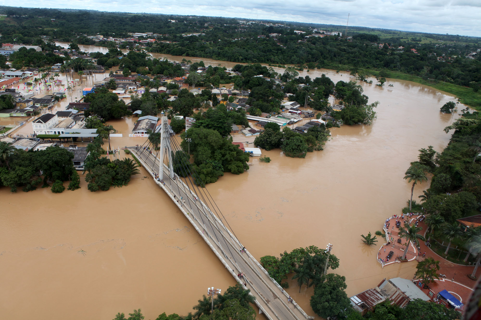 Fotos: Sérgio Vale/Secom